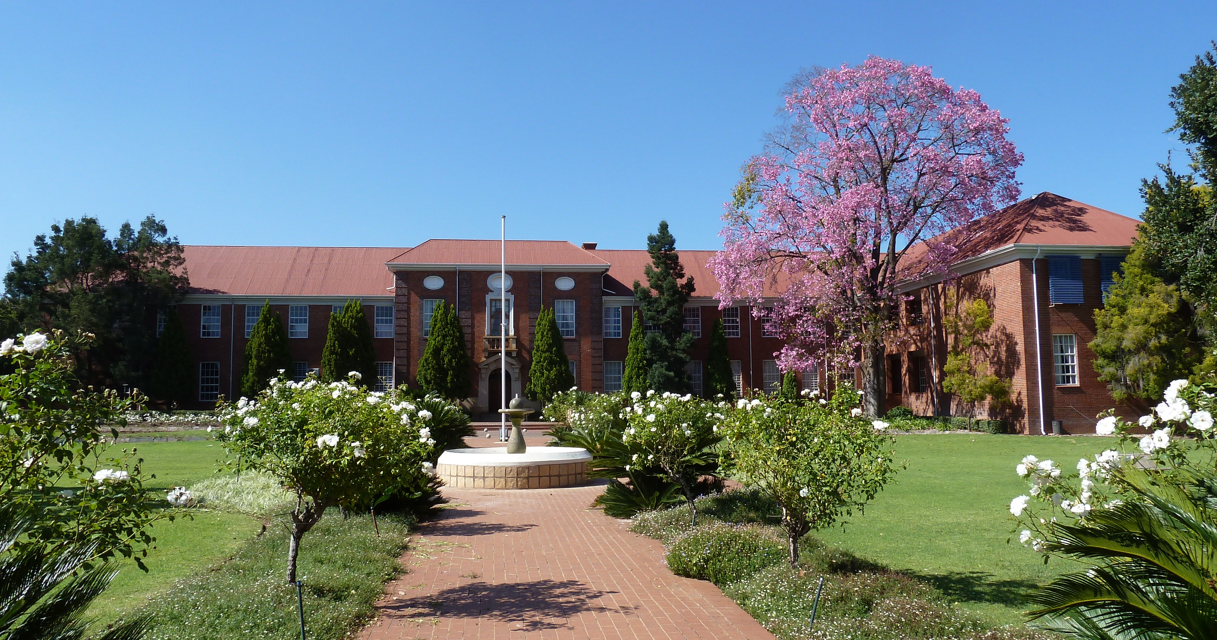 Hoofgebou van die Afrikaanse Hoër Meisieskool in Elandspoort 357-Jr, Pretoria